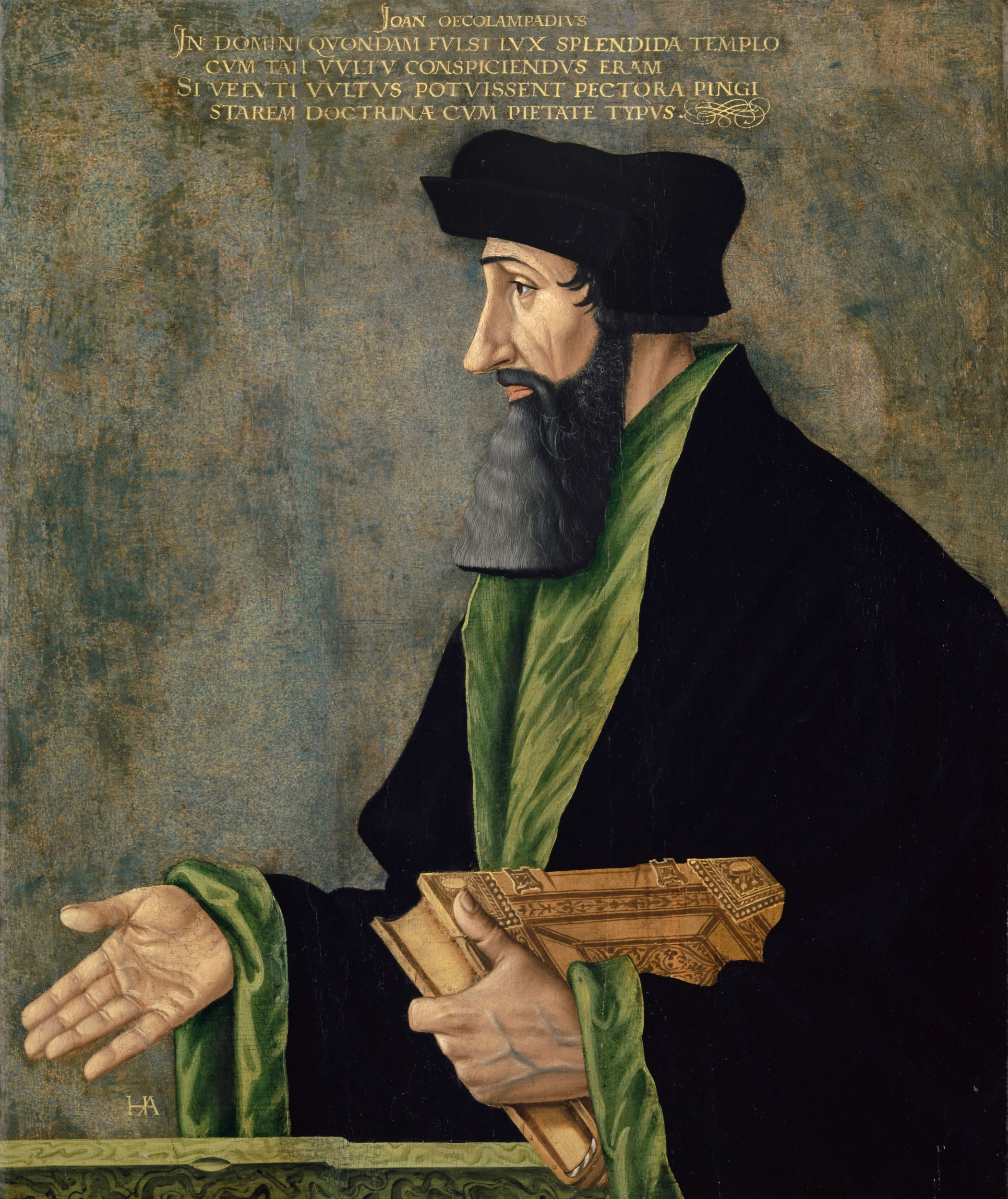 Hans Asper: Bildnis des Johannes Oekolampad, um 1531/1550. HxB: 62 x 51.5 cm; Mischtechnik auf Lindenholz. Kunstmuseum Basel, Inv. 12